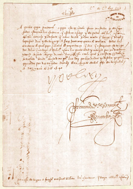 Cédula realizada por Carlos I de España y V de Alemania en la que se ordena el traslado de documentos desde la Chancillería de Valladolid al castillo de Simancas, donde ha ordenado que se cree un archivo centralizado para la corona castellana. Se emite en Bruselas y se conserva en el AGS.